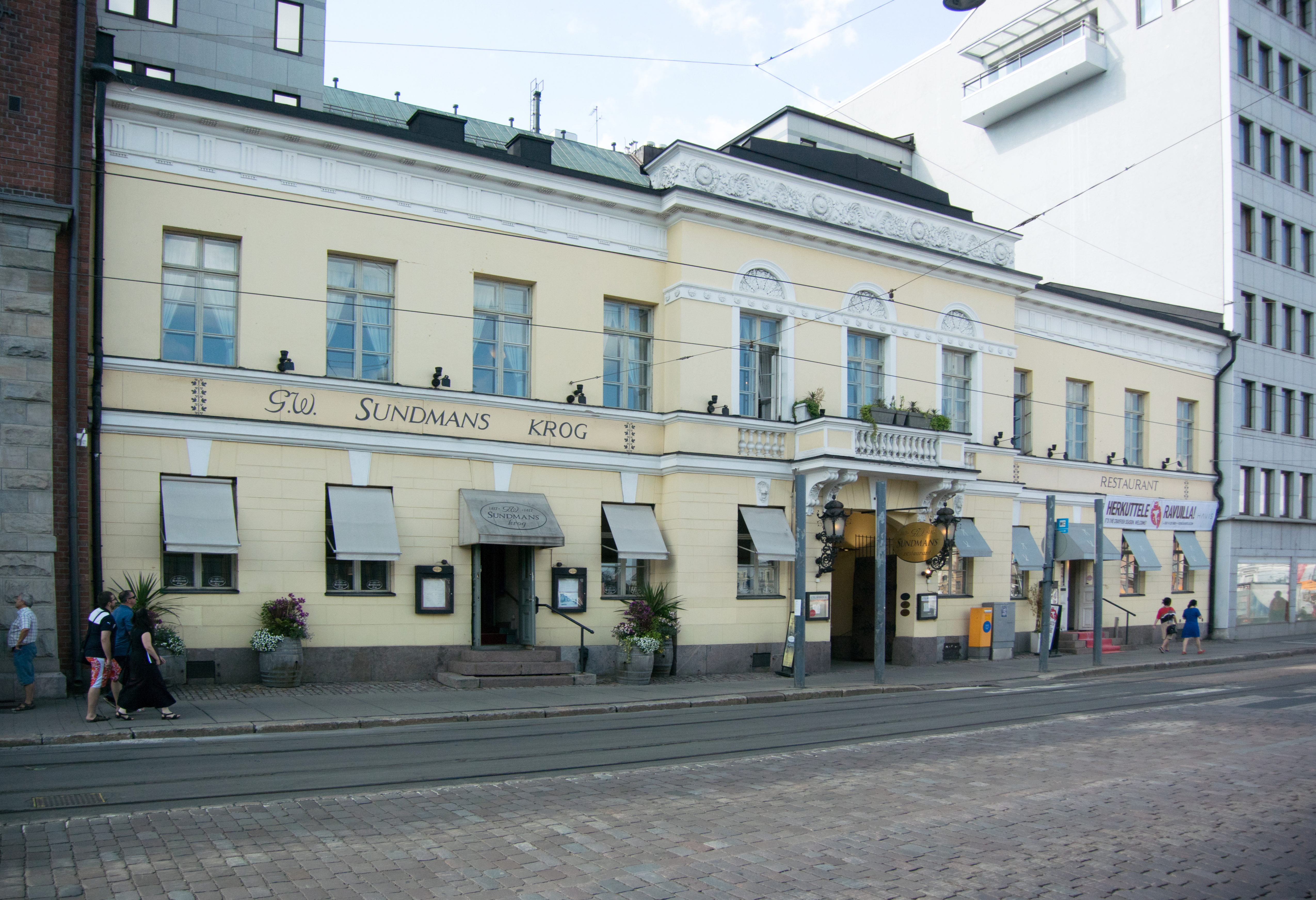 Ravintola G.W. Sundmans Helsingissä